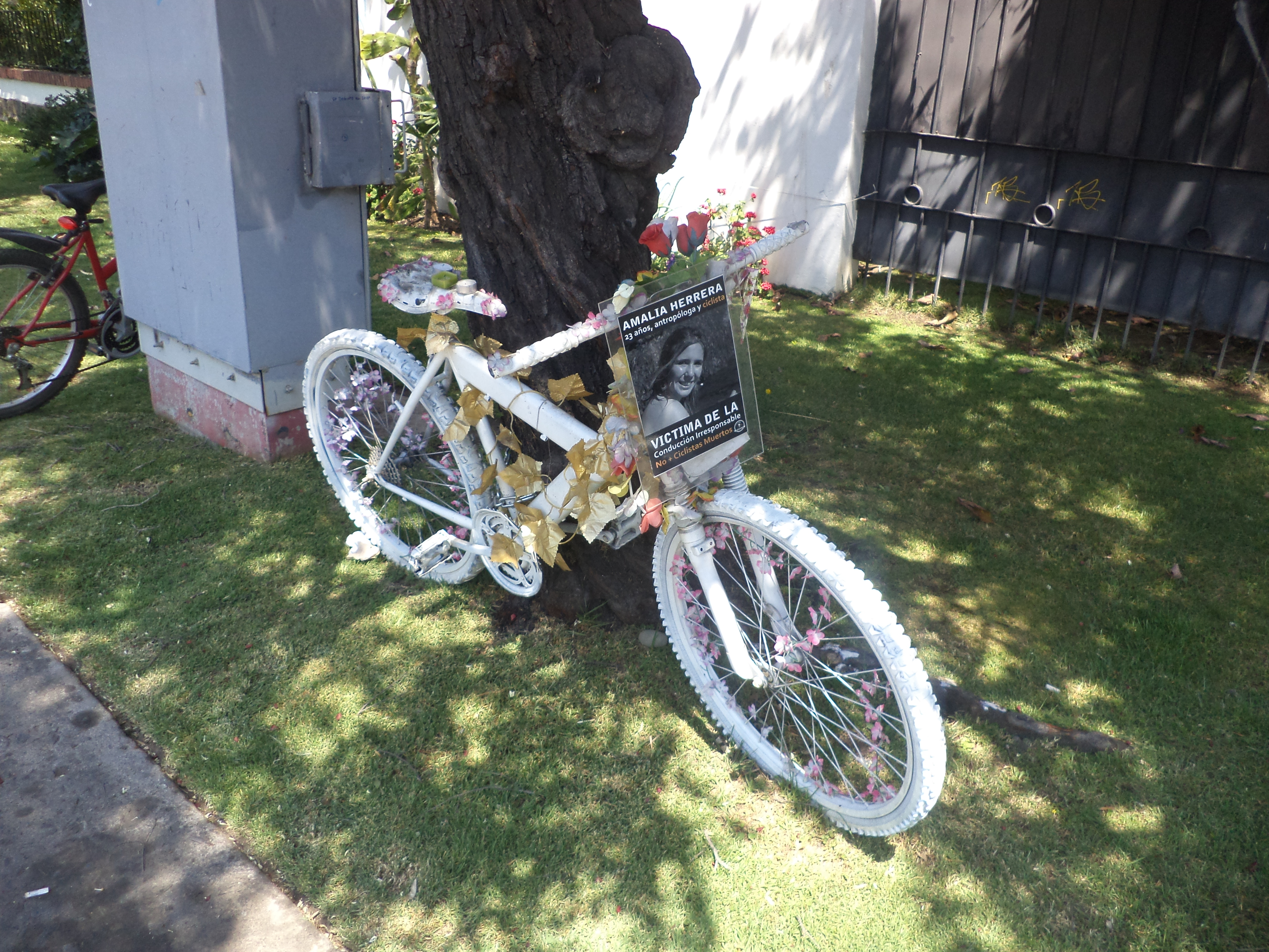 Animita con una bicicleta pintada de blanco para conmemorar la muerte de Amalia Herrera, joven ciclista de 23 años atropellada por un conductor irresponsable. Esta animita ubicada en Avda Echeñique con E. Parada, en la comuna de Ñuñoa en Santiago de Chile.